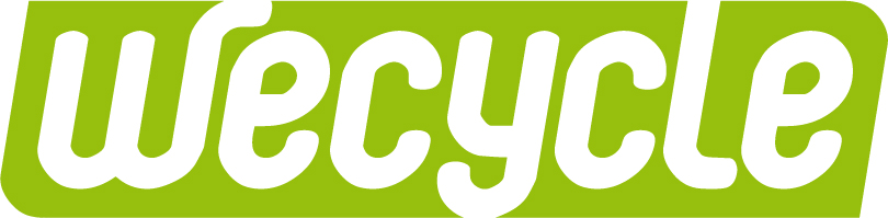 Officiele logo van stichting Wecycle